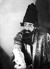 Corsu: A. Karakhanov as Ibragim-khan (Vagif, Samad Vurgun). Azerbaijani theatre of Yerevan. 1941. Rej. - B. Qalandarli.